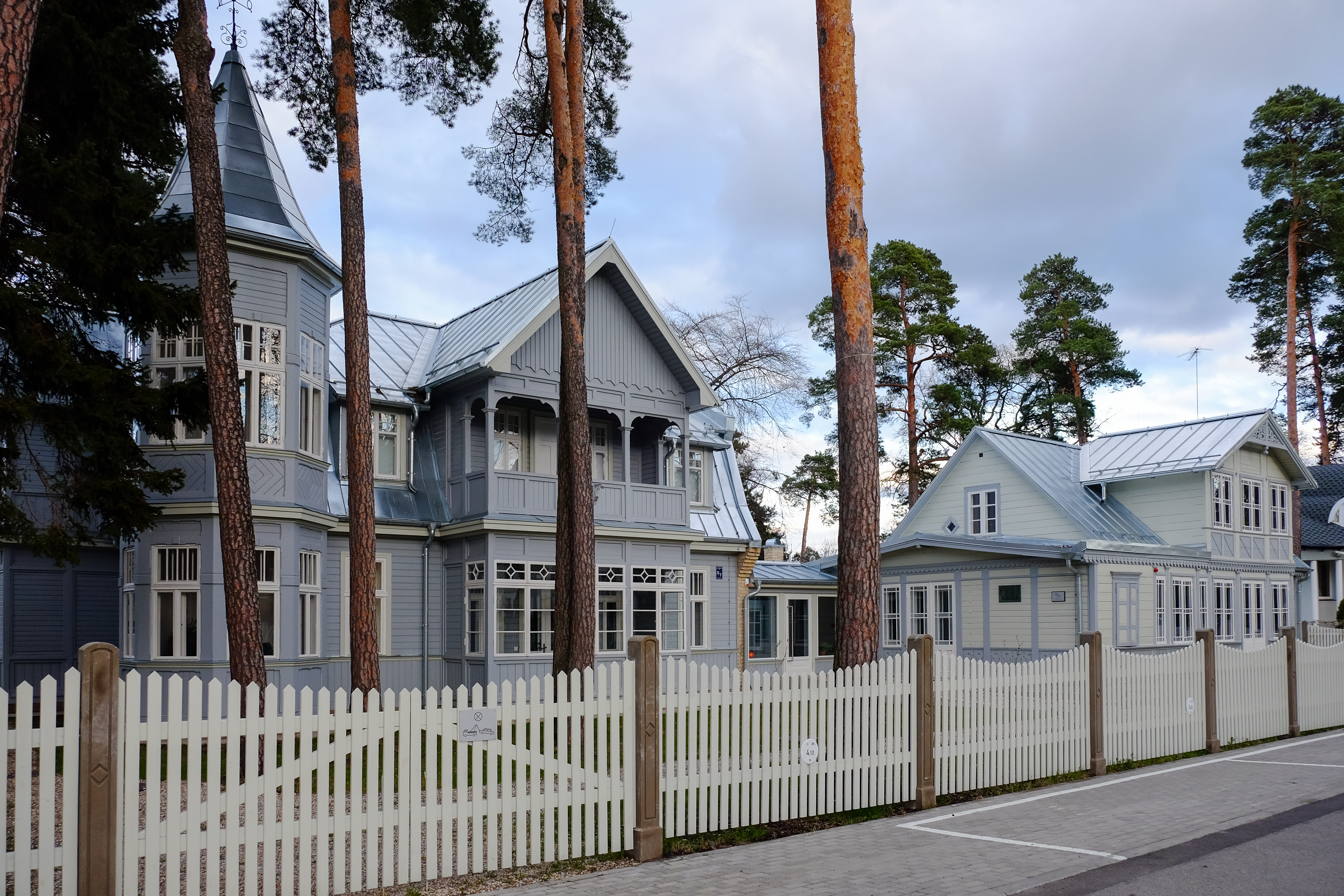 Dzejnieka Raiņa dzīves vieta, Jūrmala, Jāņa Pliekšāna iela 7